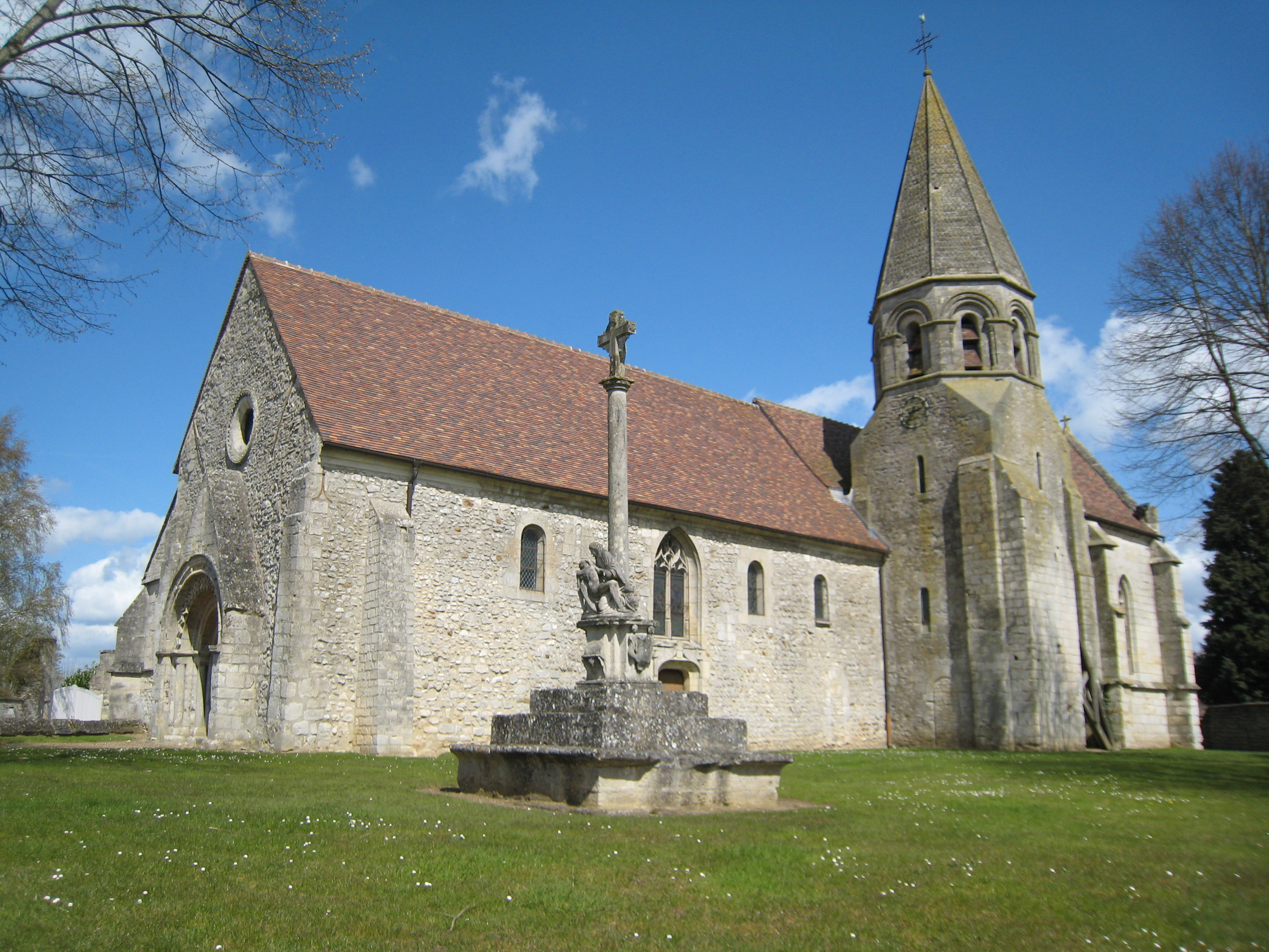 Eglise de Lierville, Oise, France